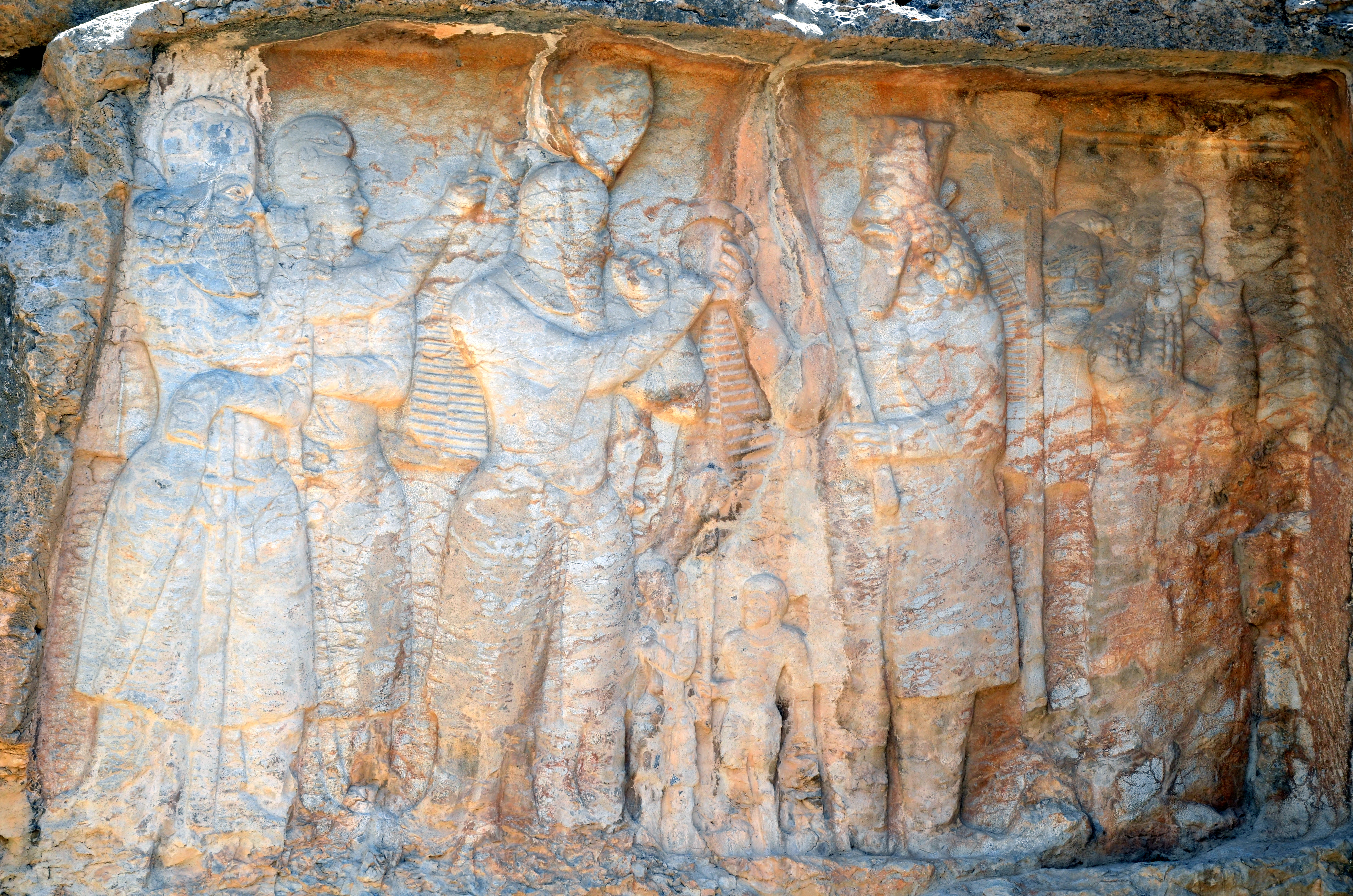 Marvdasht - Rajab Inscription (Naghsh Rajab)